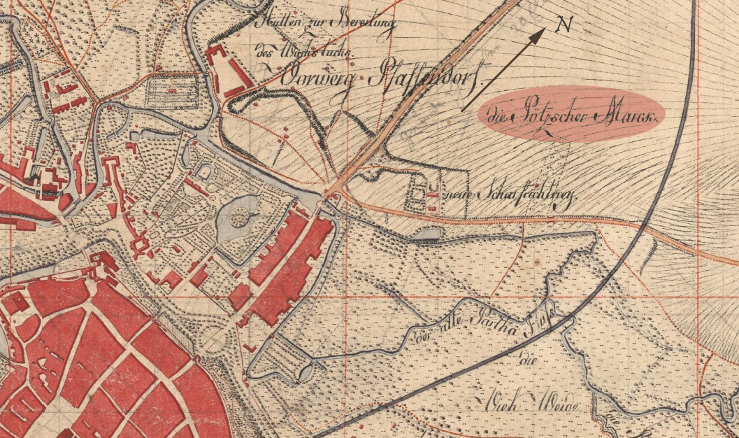 Die Petzscher Mark auf einer Karte um 1800 (Ausschnitt aus Meilenblätter von Sachsen 1780-1806)